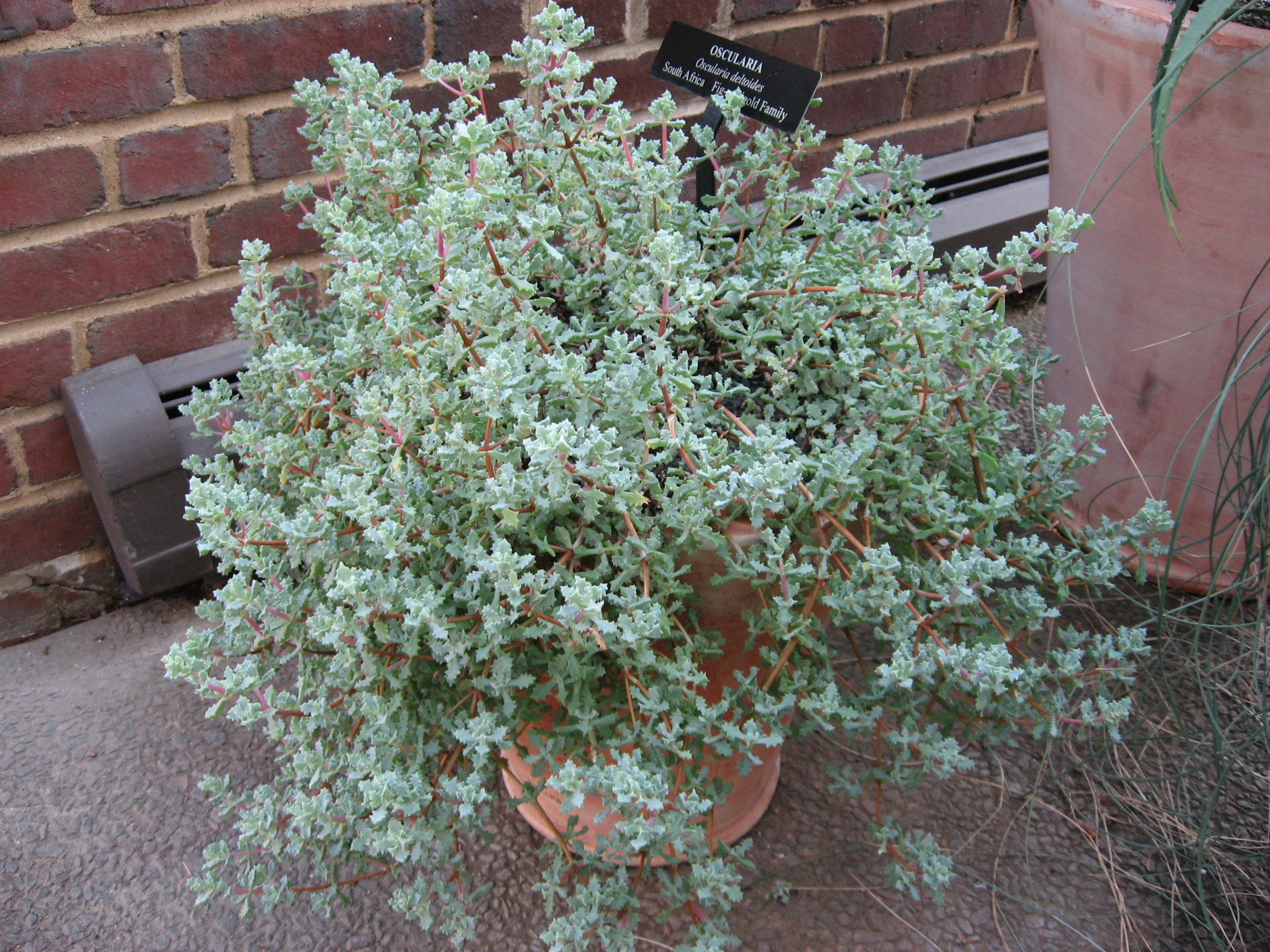 Oscularia deltoides